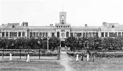 1903年落成的北洋大学主楼